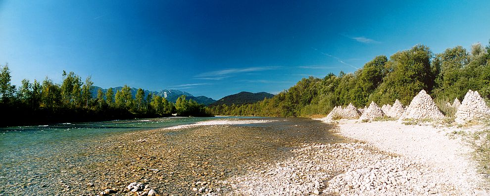 Die Isarpyramiden zwischen Arzbach und Bad Tölz. Im Hintergrund die Benediktenwand. Photograph: Florian Schott